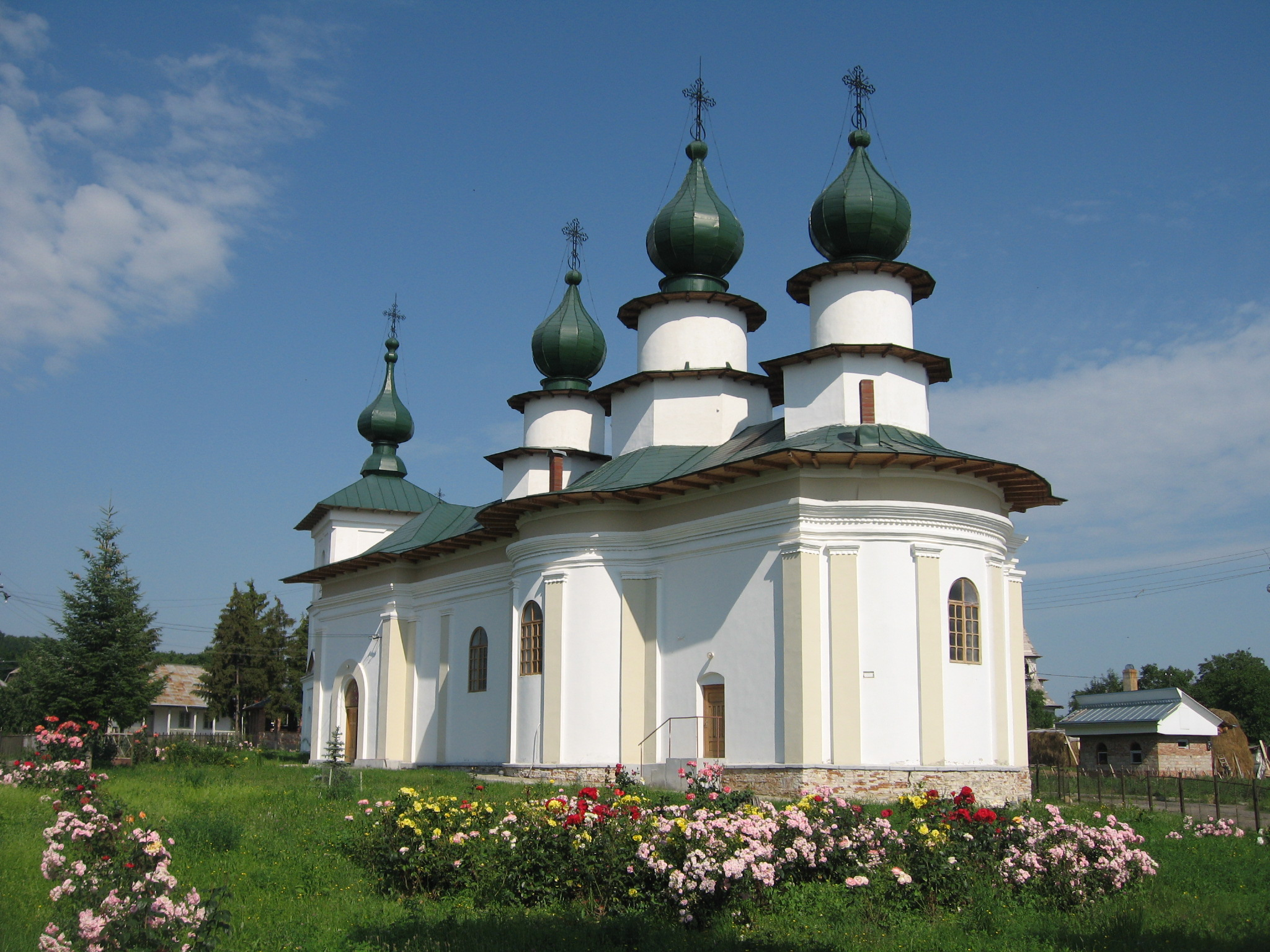 Mănăstirea Agafton